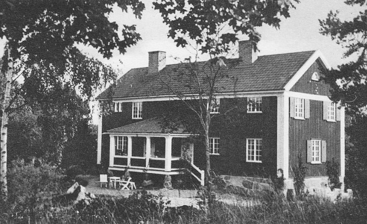 Smedslättens gård 1925, Smedslätten, Bromma, Stockholm.